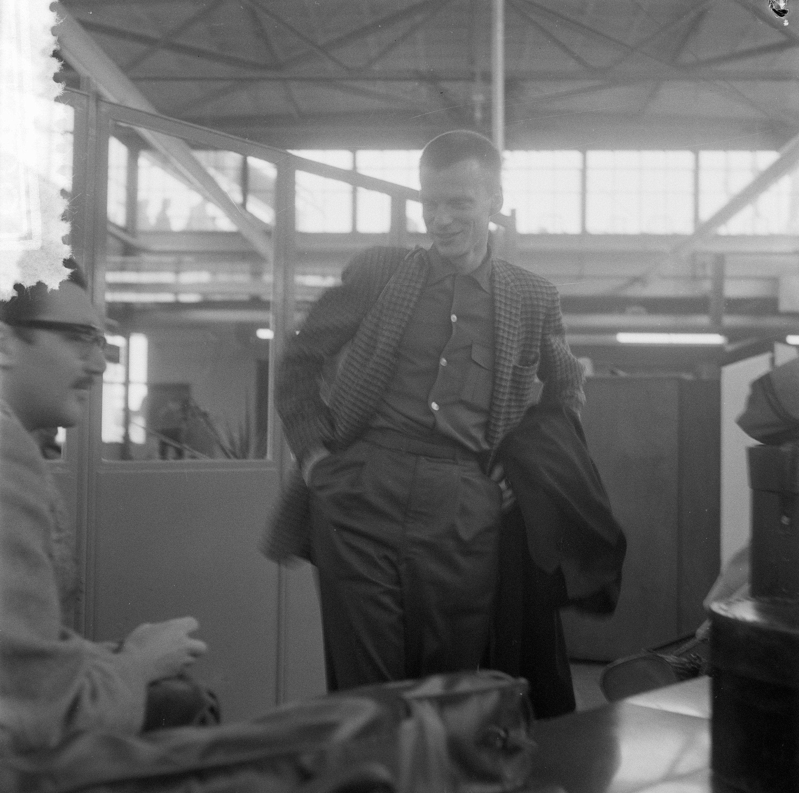 Collectie / Archief : Fotocollectie Anefo Reportage / Serie : [ onbekend ] Beschrijving : Aankomst Gerry Mulligan op Schiphol Datum : 18 mei 1957 Locatie : Noord-Holland, Schiphol Persoonsnaam : Mulligan, Gerry Fotograaf : Koch, Eric / Anefo Auteursrechthebbende : Nationaal Archief Materiaalsoort : Negatief (zwart/wit) Nummer archiefinventaris : bekijk toegang 2.24.01.03 Bestanddeelnummer : 908-6011